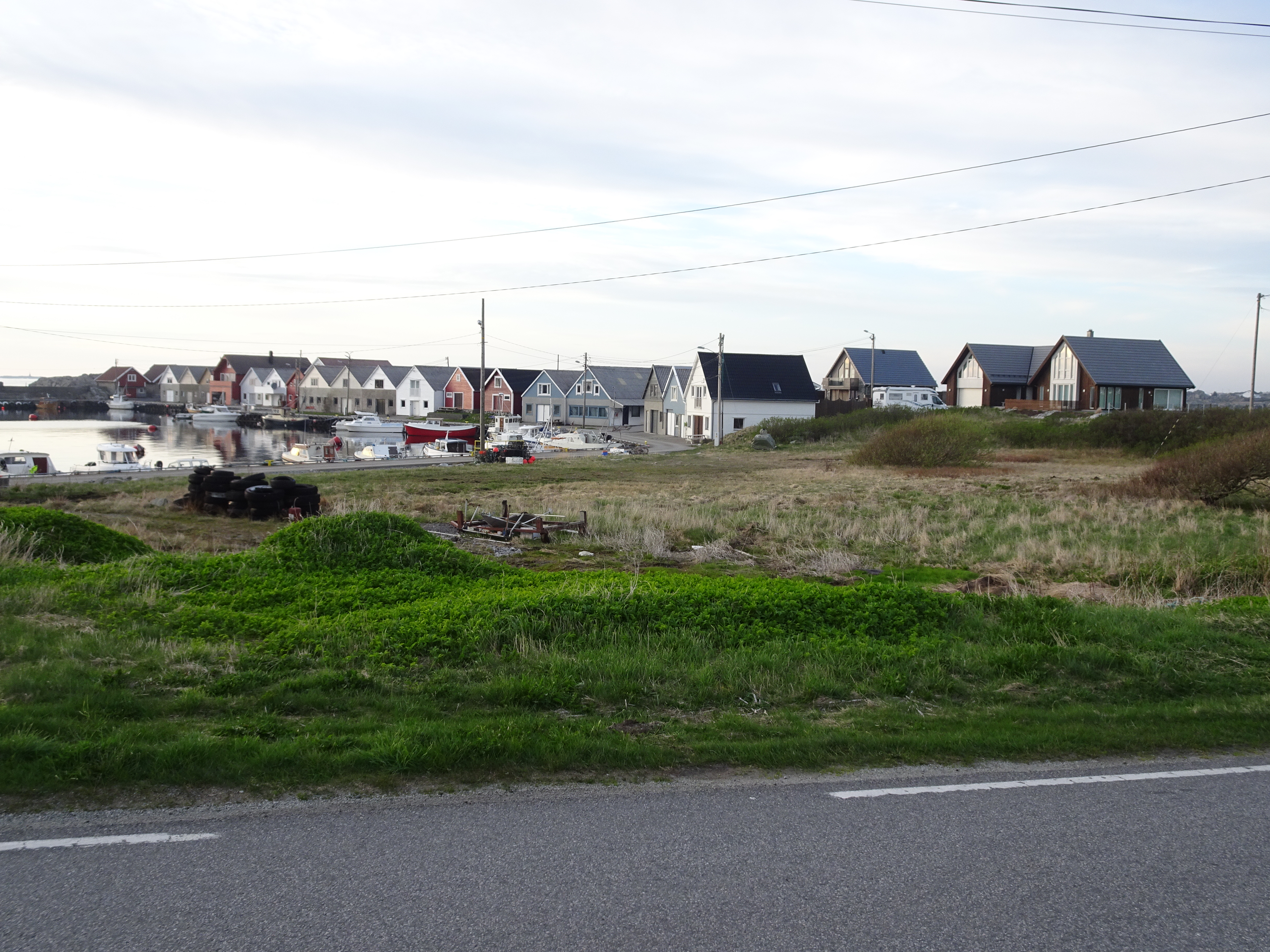 Ferkingstad havn på Karmøy